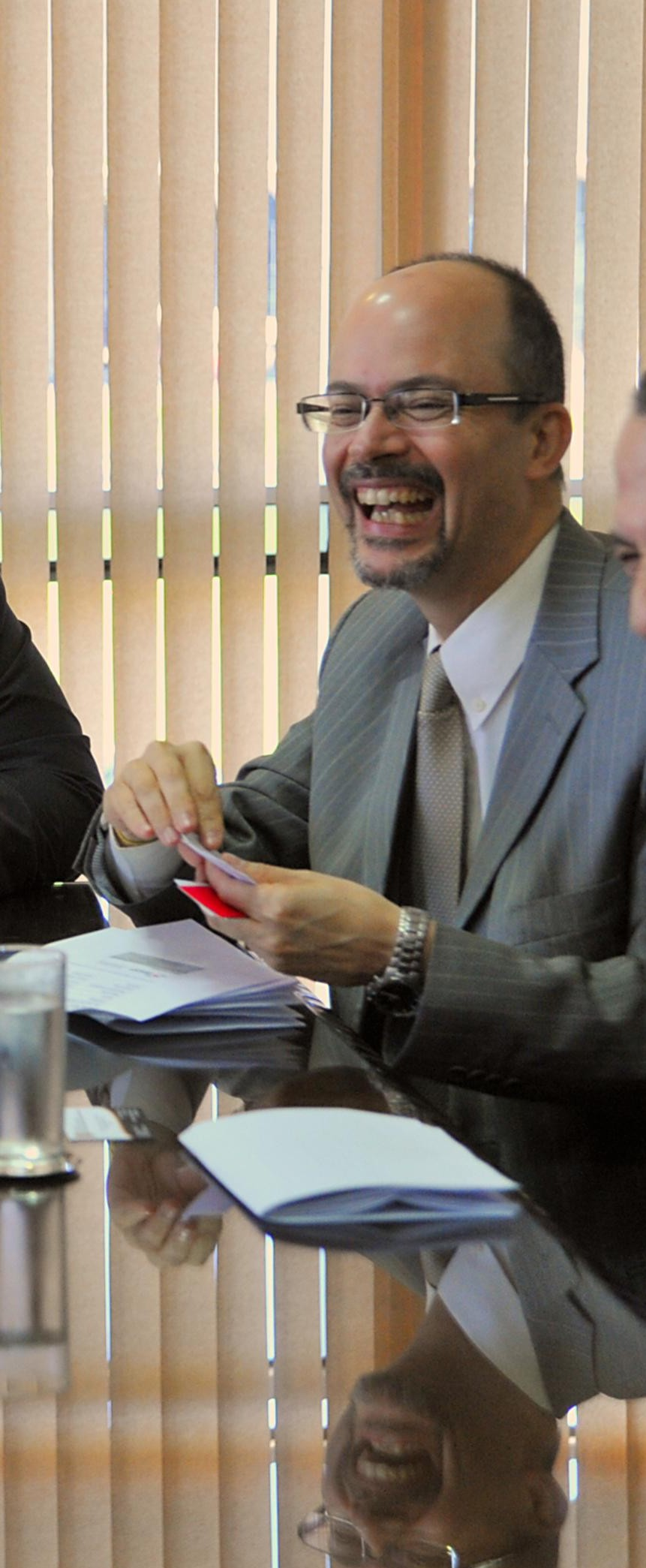 rasília - O ministro da Justiça, Luiz Paulo Barreto, recebe o ministro do Turismo, Luiz Barretto, no Ministério (José Cruz/ABr)